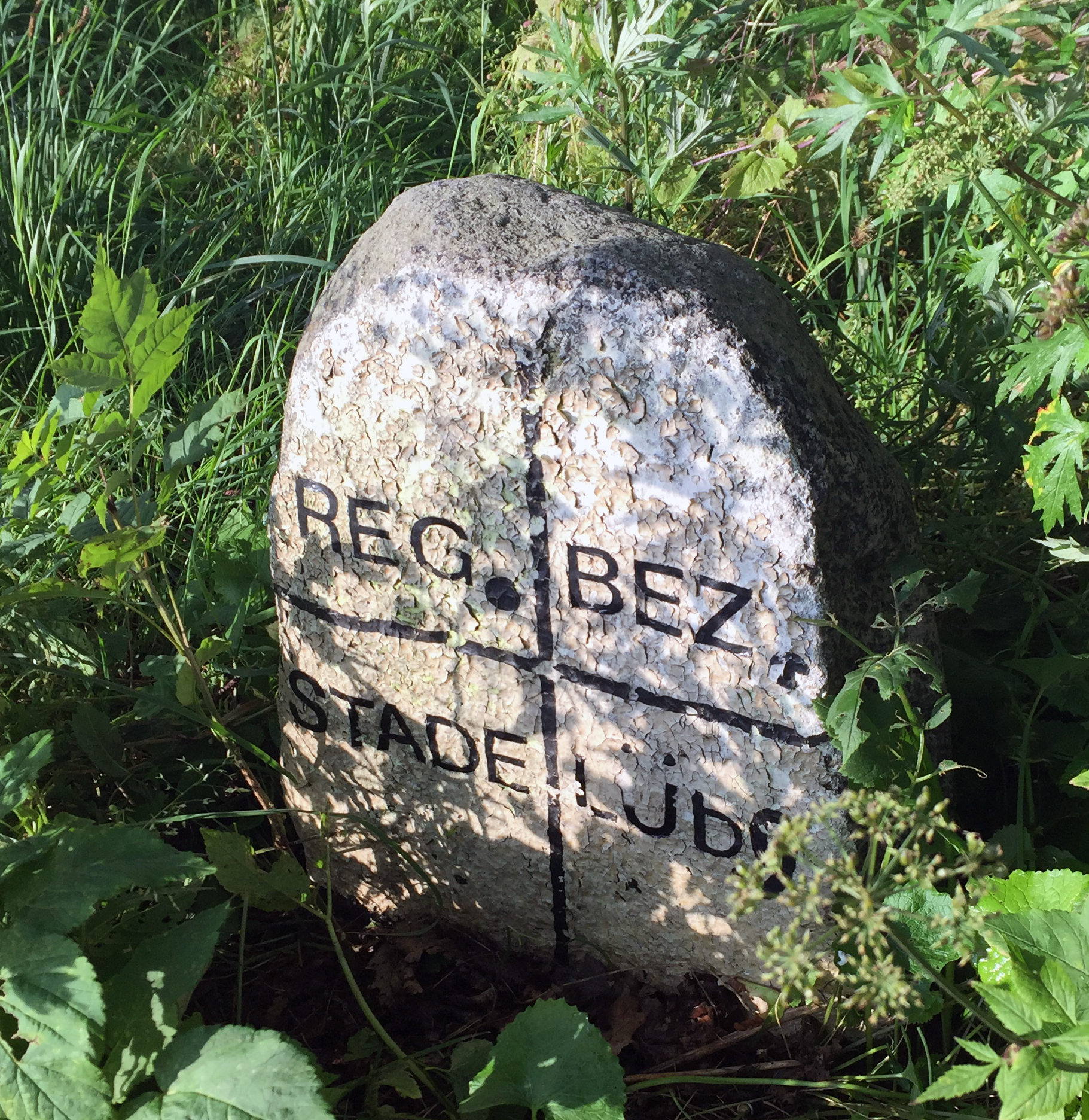 Grenzmarkierung Landscheide Eilendorf, Ecke "An der Landscheide" und "Harbuger Straße", Anfang vom Ostmoorgraben, Grenze zwischen den Regierungsbezirken Stade und Lüneburg bis 1972